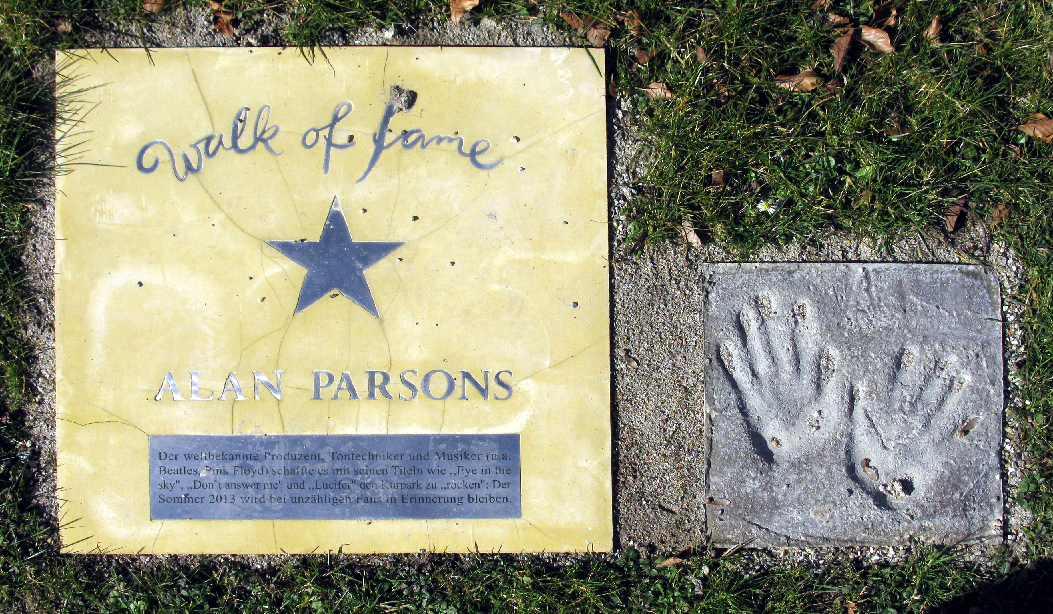 Alan Parsons auf dem Walk of fame im Kurpark von Bad Krozingen